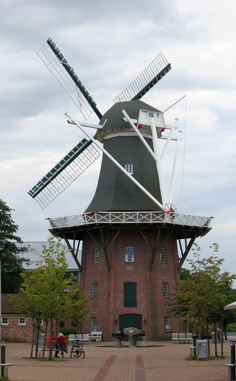 „Meyers-Mühle“ (dreistöckige Windmühle, erbaut 1888, restauriert 1999) am Hauptkanal rechts in Papenburg.